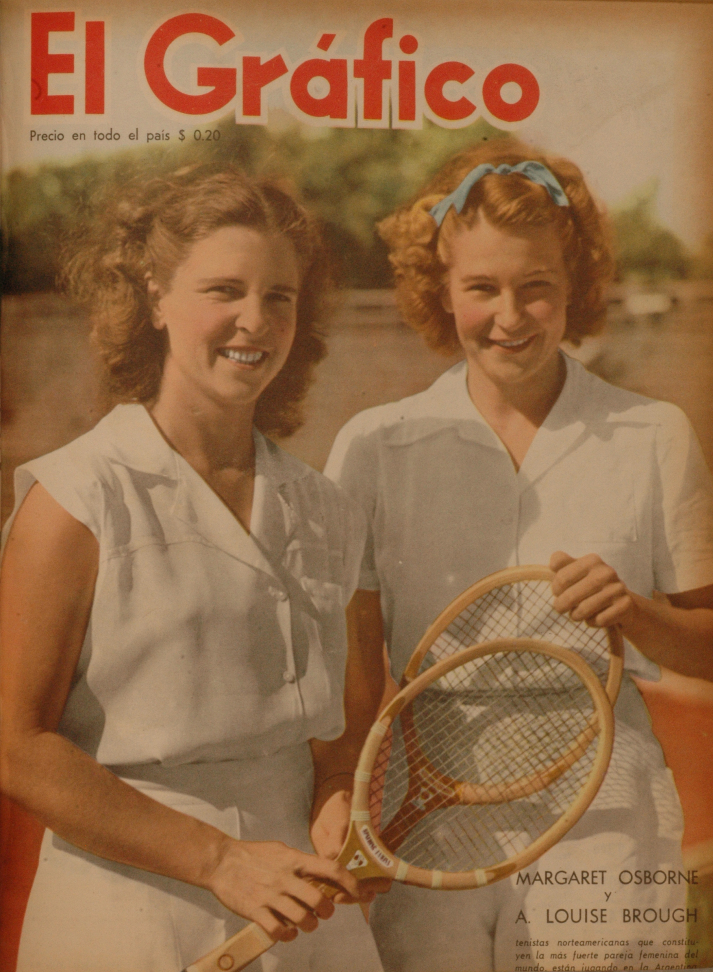 El Grafico del 22 de Noviembre de 1946. Edicion 1428